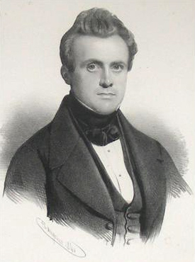 Portrait de Pierre De Decker (1812-1981), Prime minister of Belgium (1855-1857).